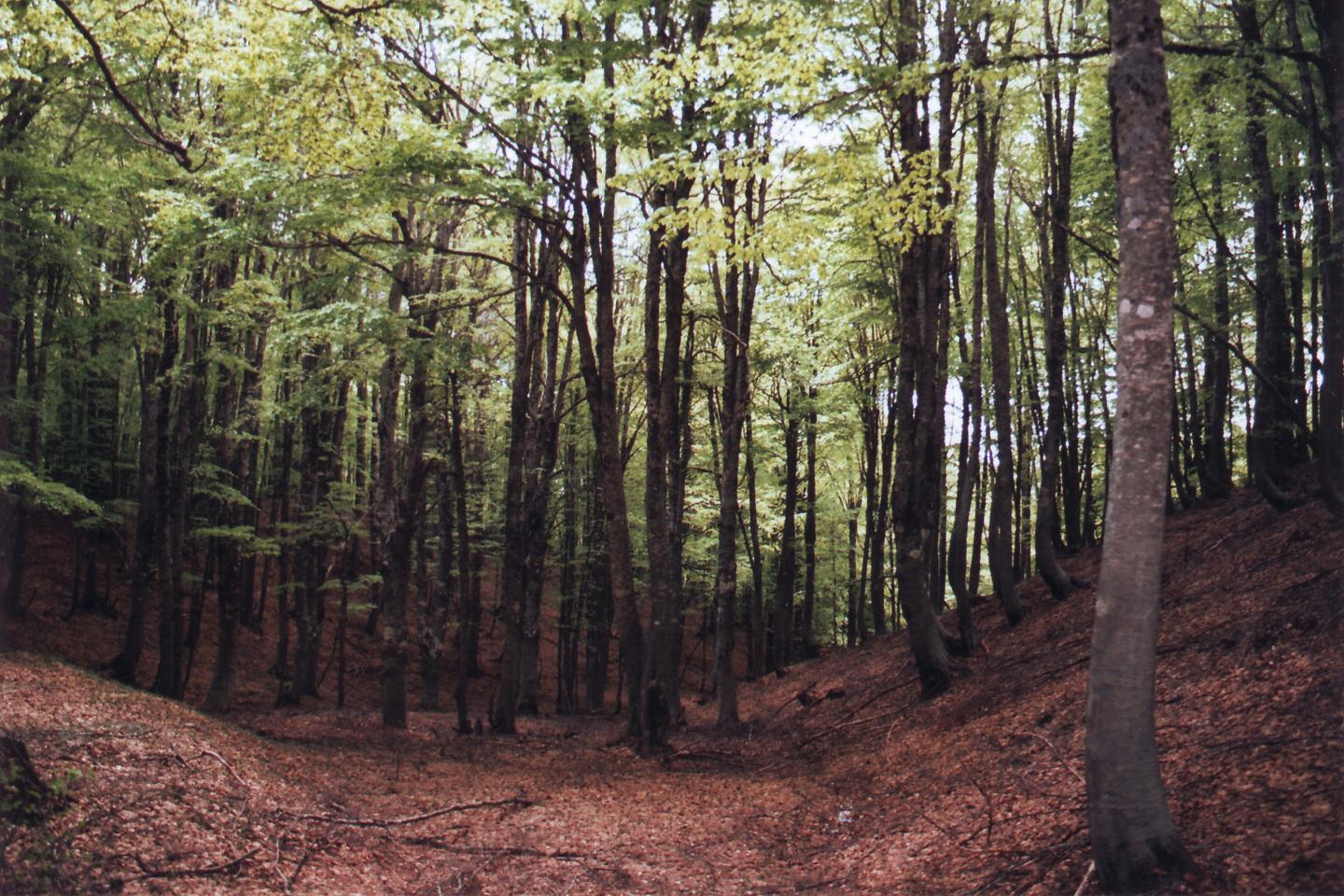 Autore della foto: Bruno Francesco Pileggi